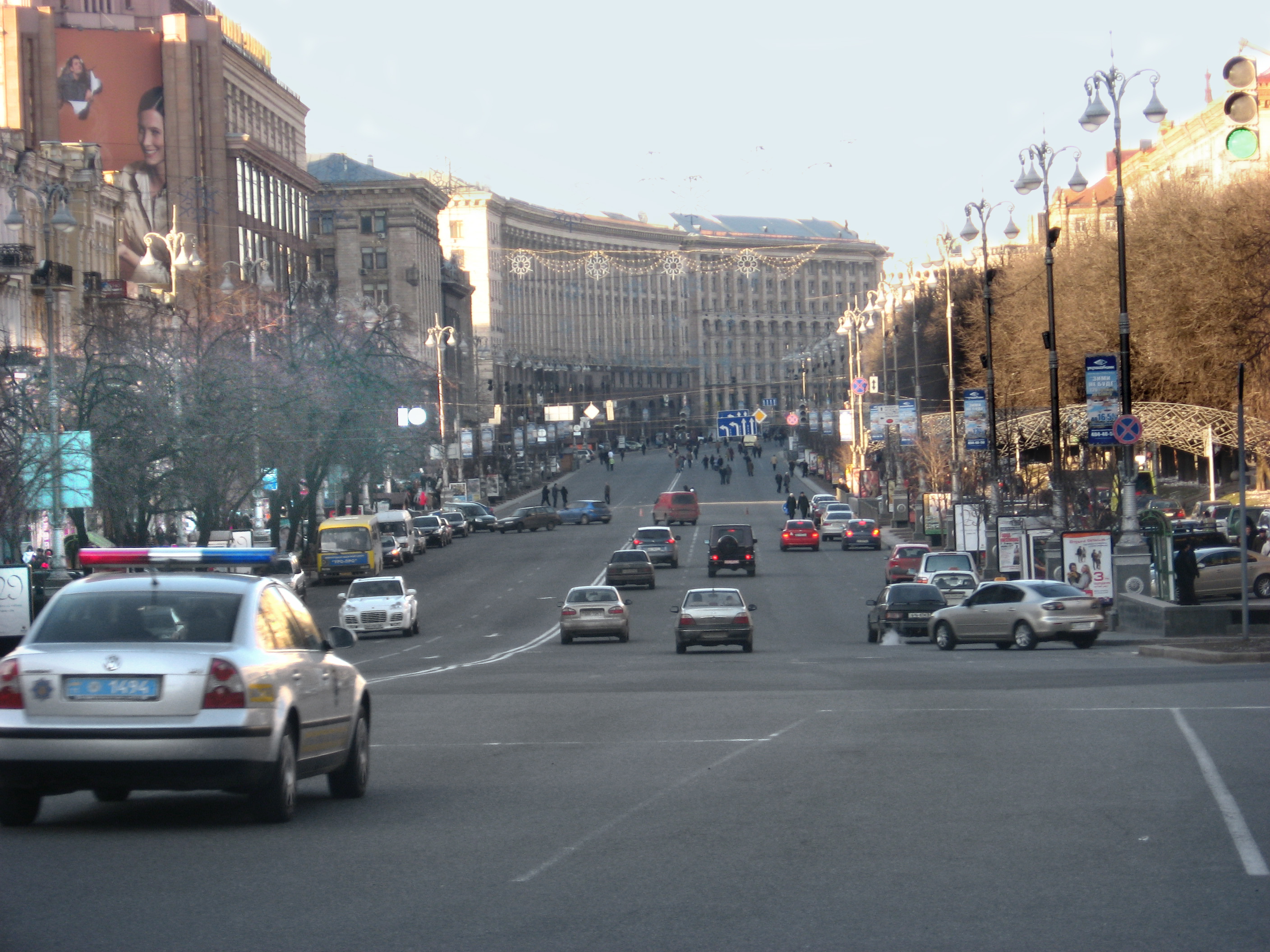 Khreschatyk, Kiev